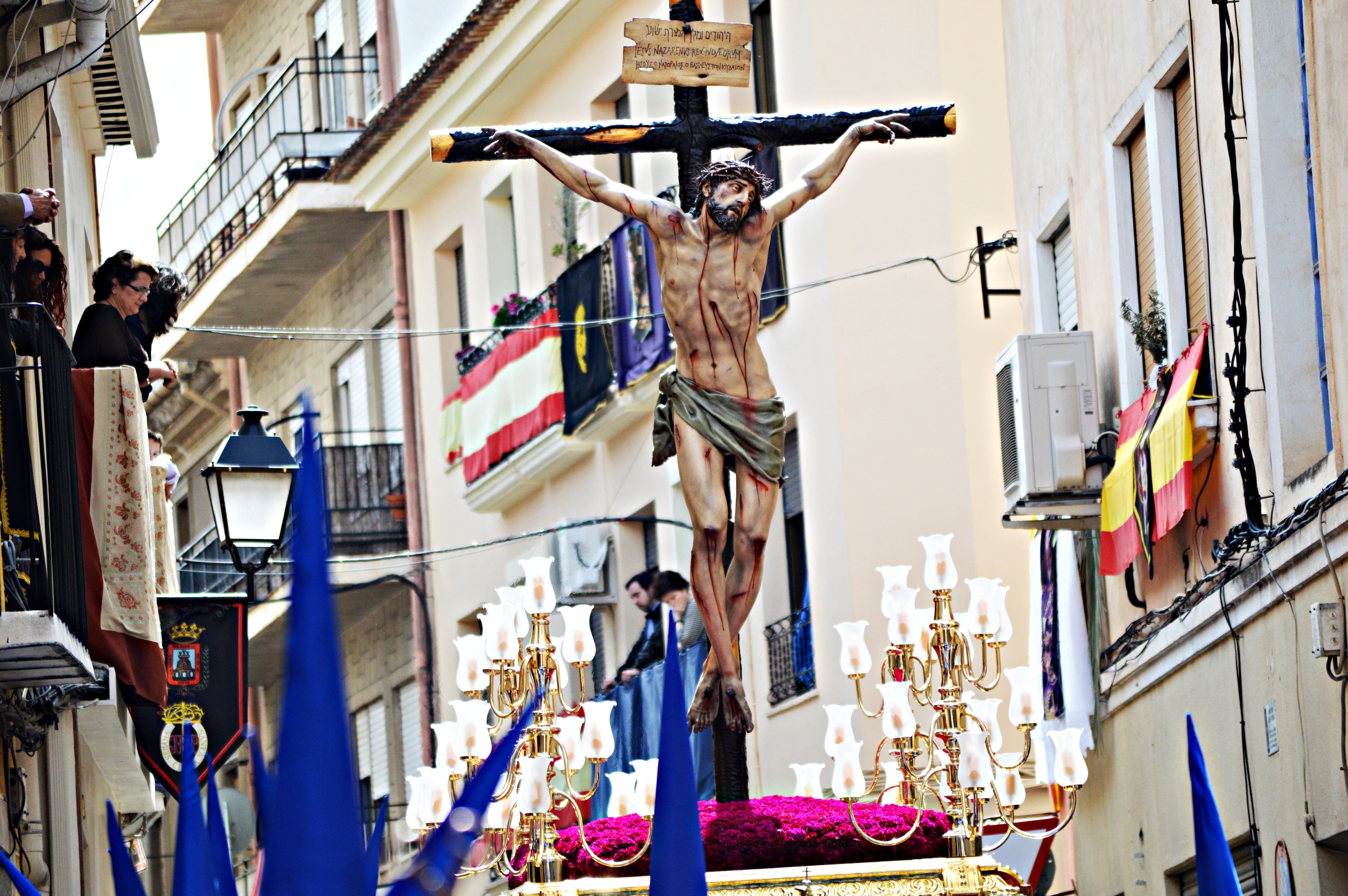 Santísimo Cristo de la Expiración de Antonio Jesús Yuste Navarro durante la Semana Santa de Cieza de 2015.